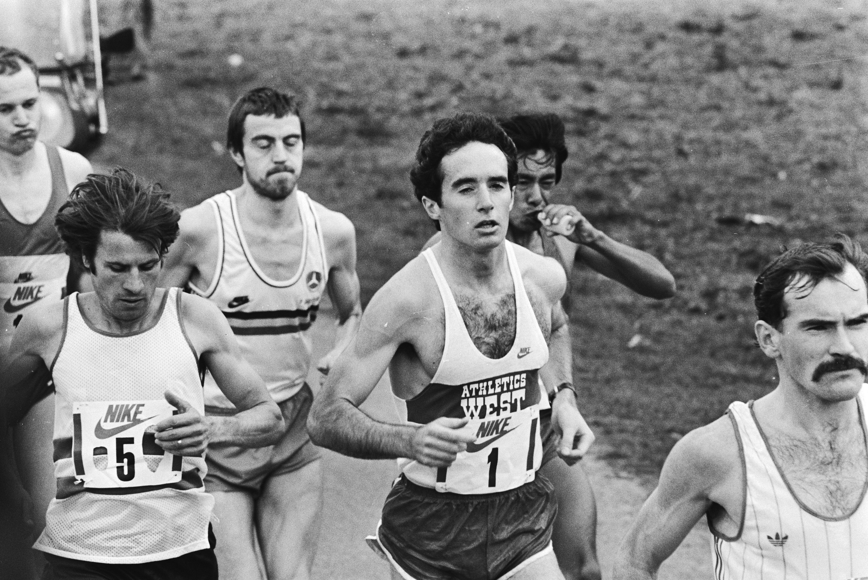 Collectie / Archief : Fotocollectie Anefo Reportage / Serie : Marathon van Rotterdam 1983 Beschrijving : Salazar (nr. 1) in actie, links naast hem Rodolfo Gómez, winnaar in 1982 Datum : 10 april 1983 Locatie : Rotterdam, Zuid-Holland Trefwoorden : hardlopen, marathon Persoonsnaam : Gómez, Rodolfo, Salazar, Alberto Fotograaf : Croes, Rob C. / Anefo Auteursrechthebbende : Nationaal Archief Materiaalsoort : Negatief (zwart/wit) Nummer archiefinventaris : bekijk toegang 2.24.01.05 Bestanddeelnummer : 932-5566